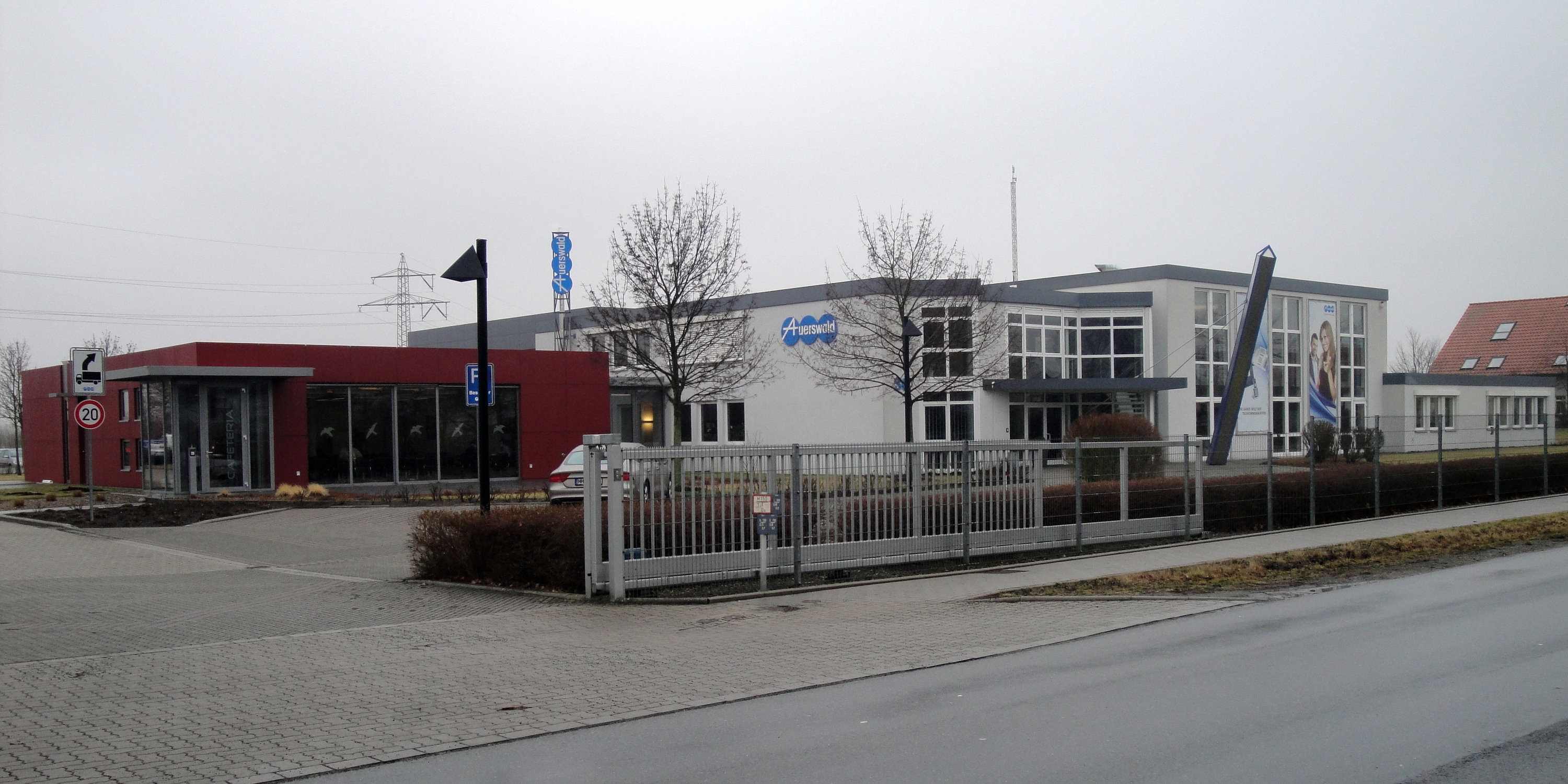 Auerswald GmbH & Co. KG (Seminarzentrum, Logistik, Fertigung) in Schandelah